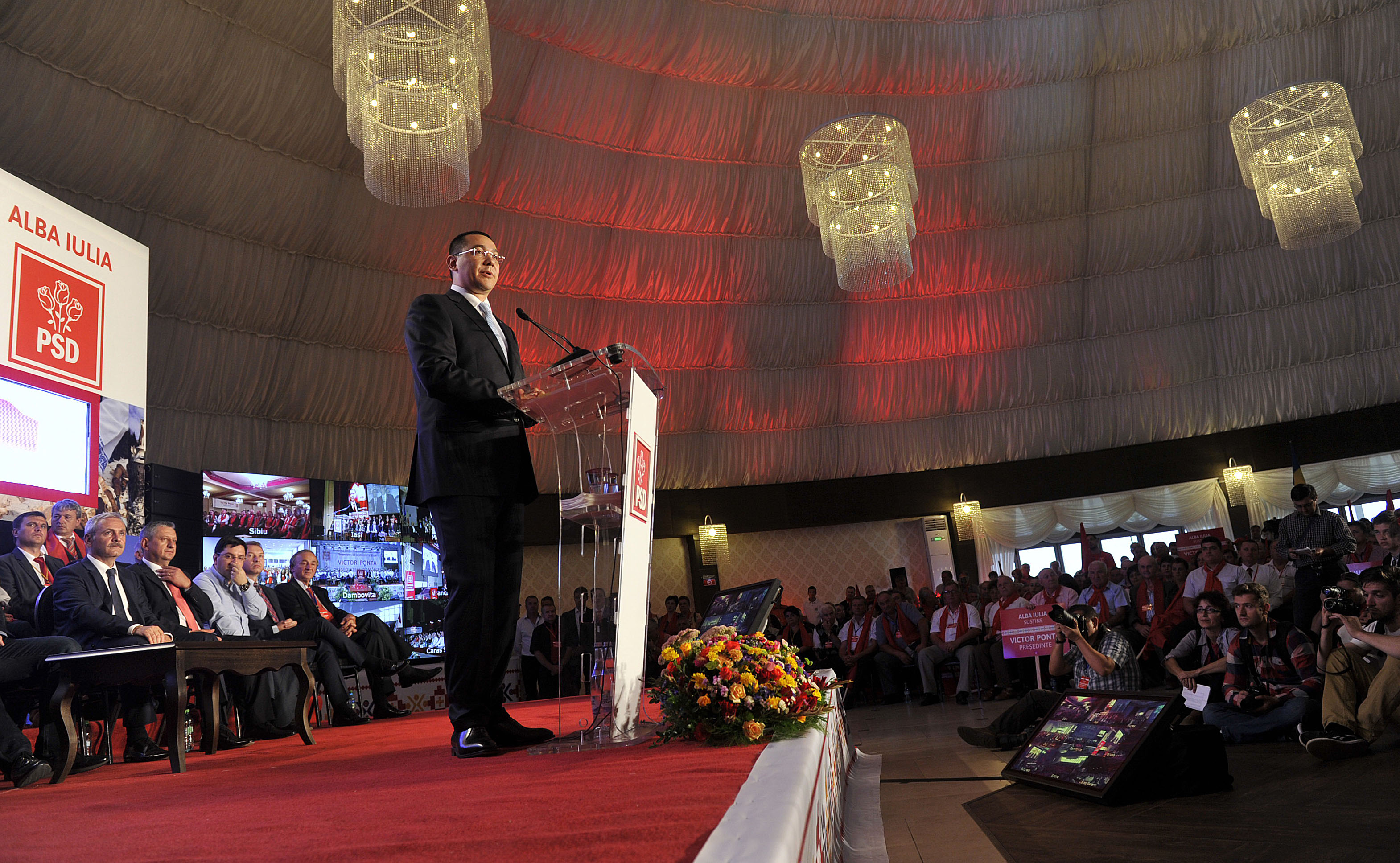 Congresul National al PSD, Alba Iulia - 12.09 (26)